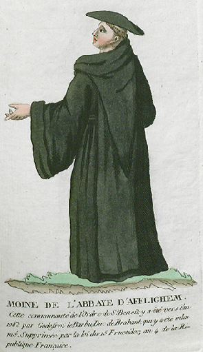 Collection de costumes de tous les ordres monastiques, supprimés à differentes époques, dans la ci-devant Belgique, Bruxelles, Philippe Joseph Maillart et sœur, 1811